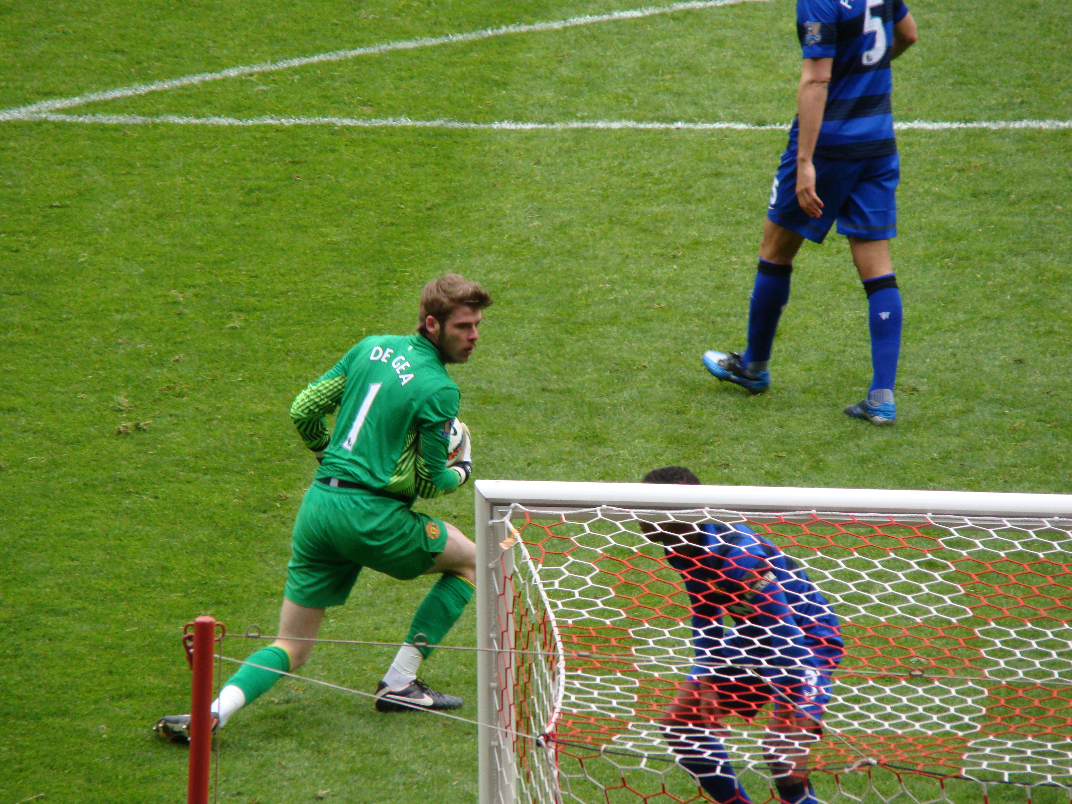 SAFC vs MUFC